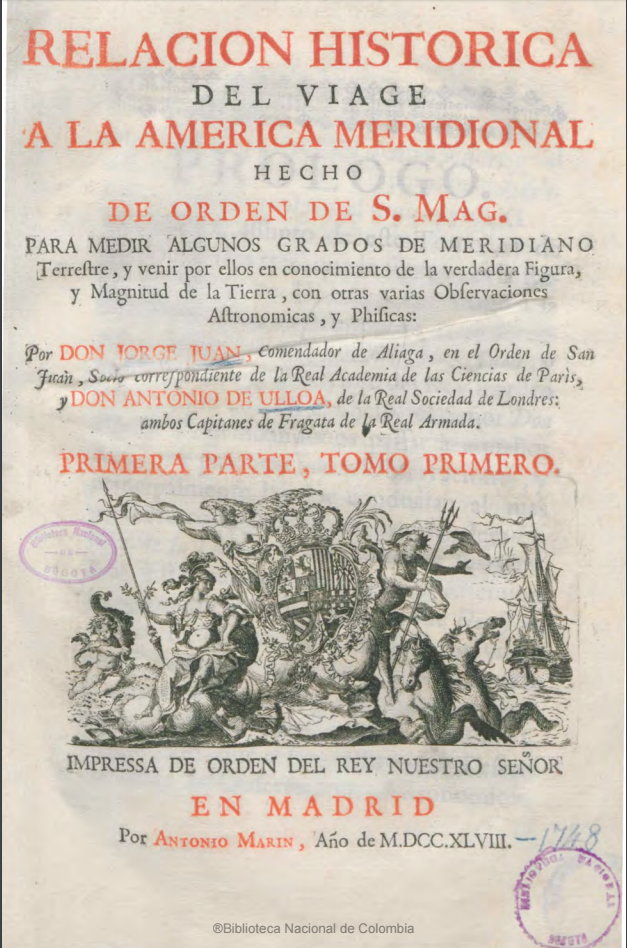 Portada del libro de Jorge Juan y Santacilia.